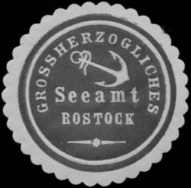 Sealing stamp Title: Gr. Seeamt Rostock Description: schwarz, weiß, geprägt Place: Rostock size: 4 cm